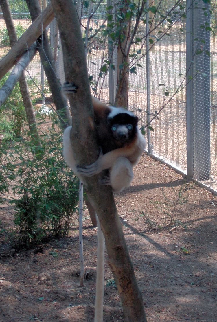 Propithecus verreauxi coronatus, Zoo de Vincennes